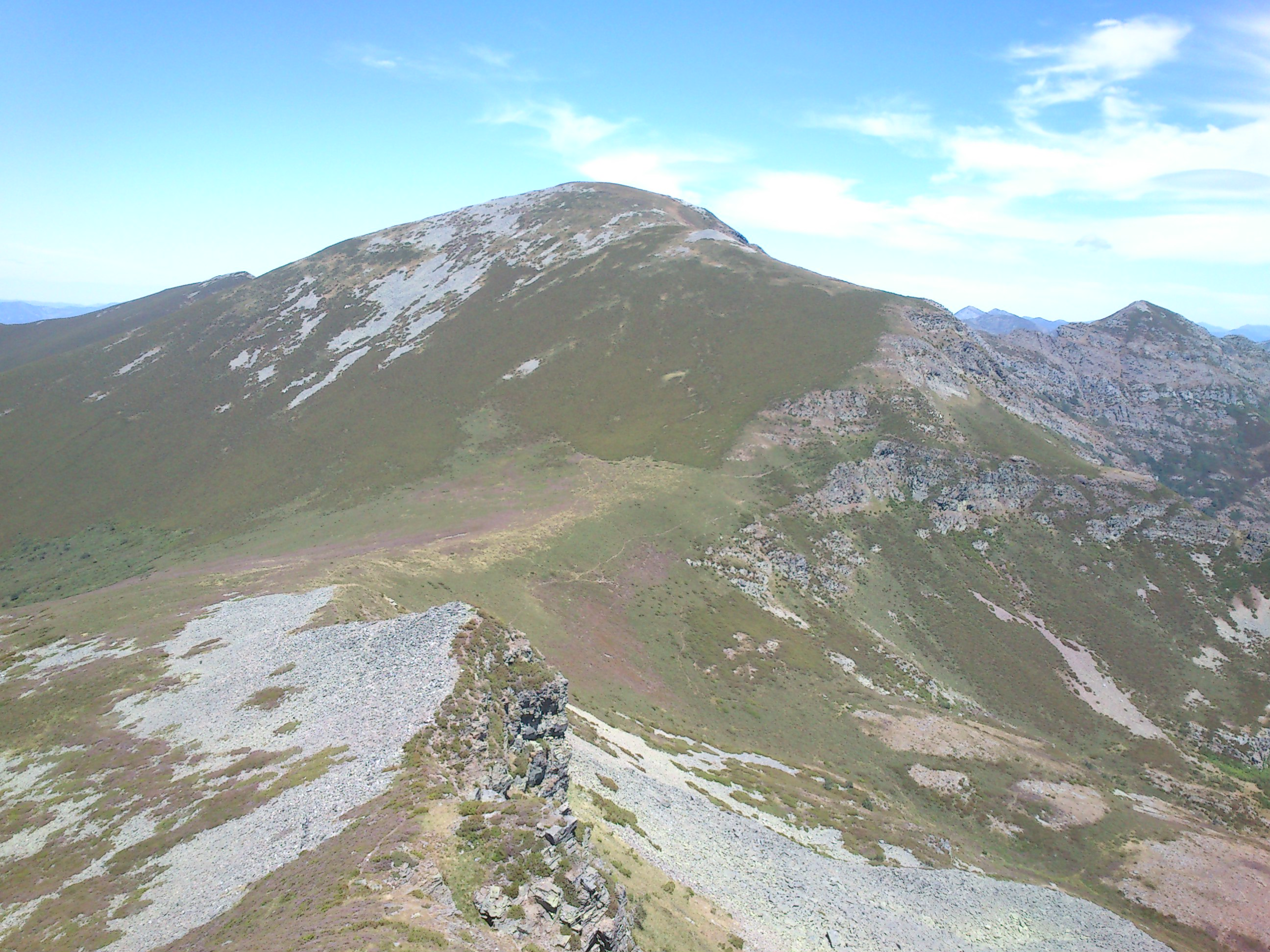 Pico cuiña desde el Penalonga